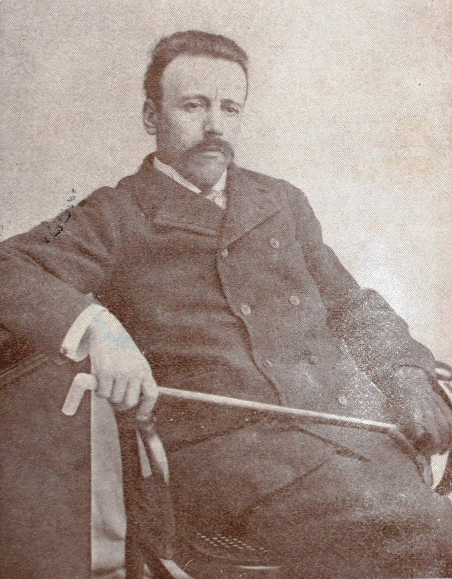 Narcís Oller. Pilar Prim. Barcelona . Selecta, 1906 (Biblioteca Selecta ; 13)